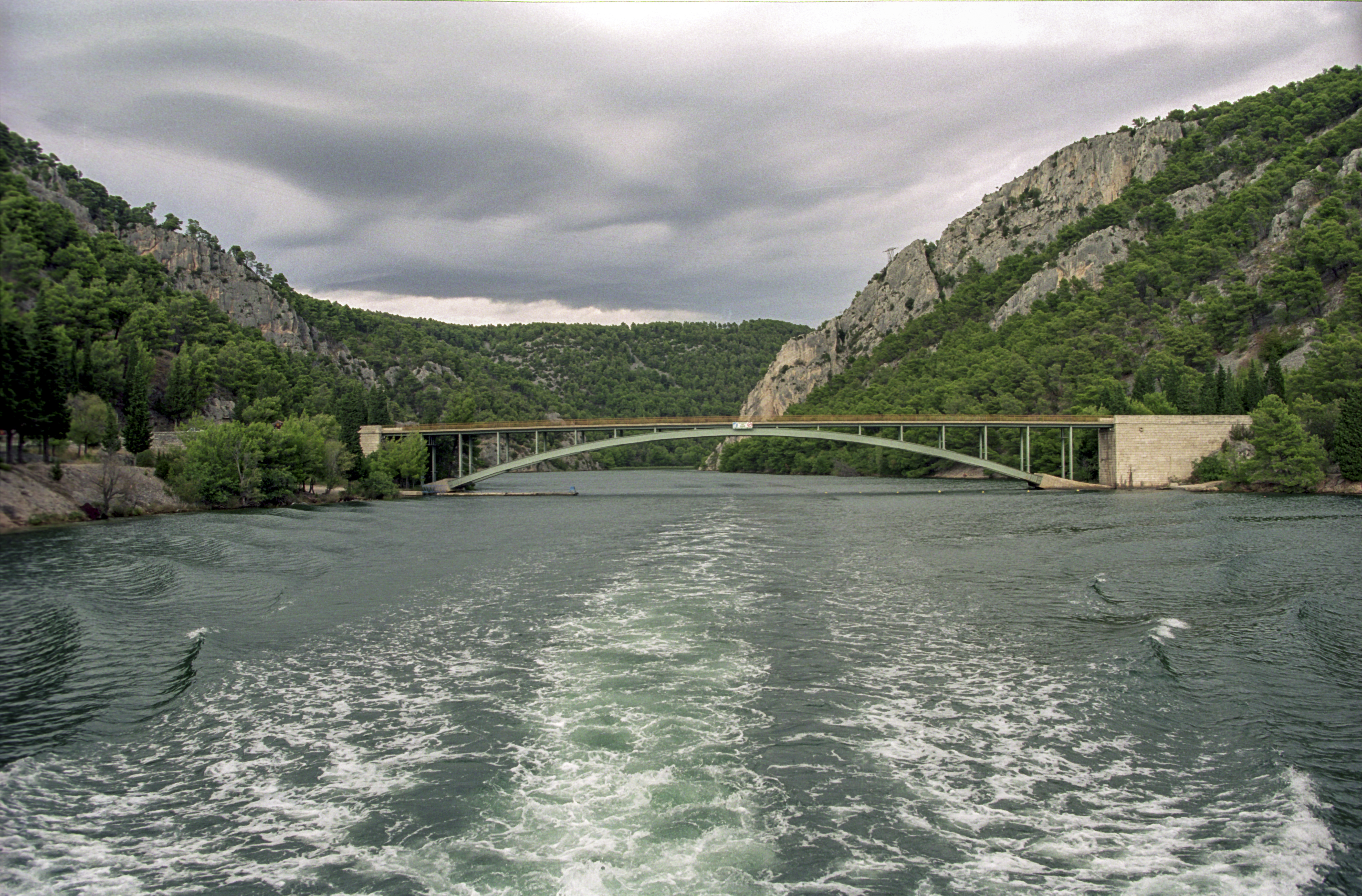 Krka River